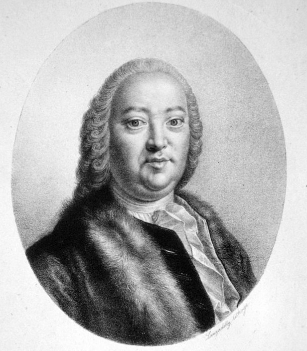 Gerad van Swieten